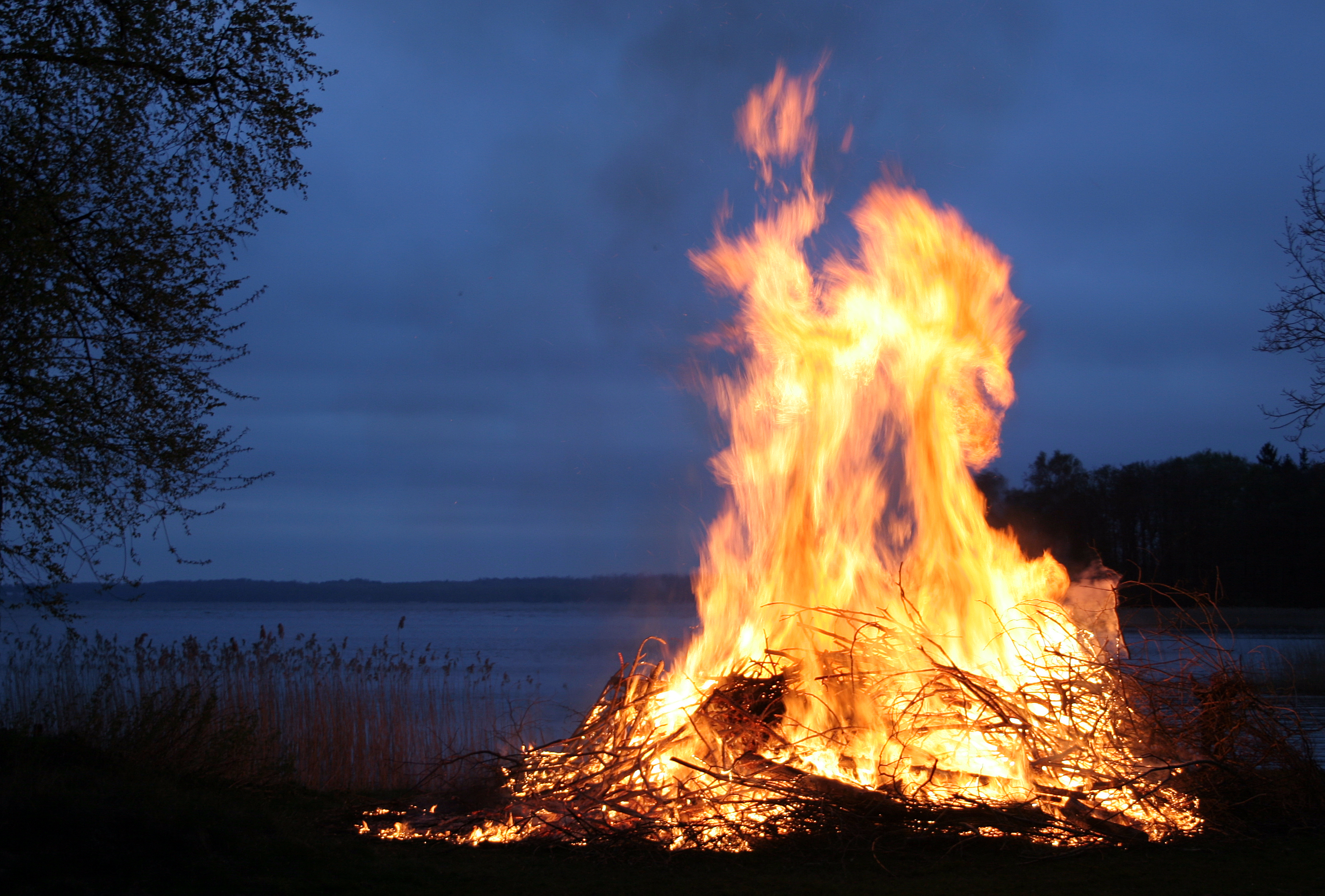 Valborgsbrasa i Gamla Bo vid Ringsjön 2008.